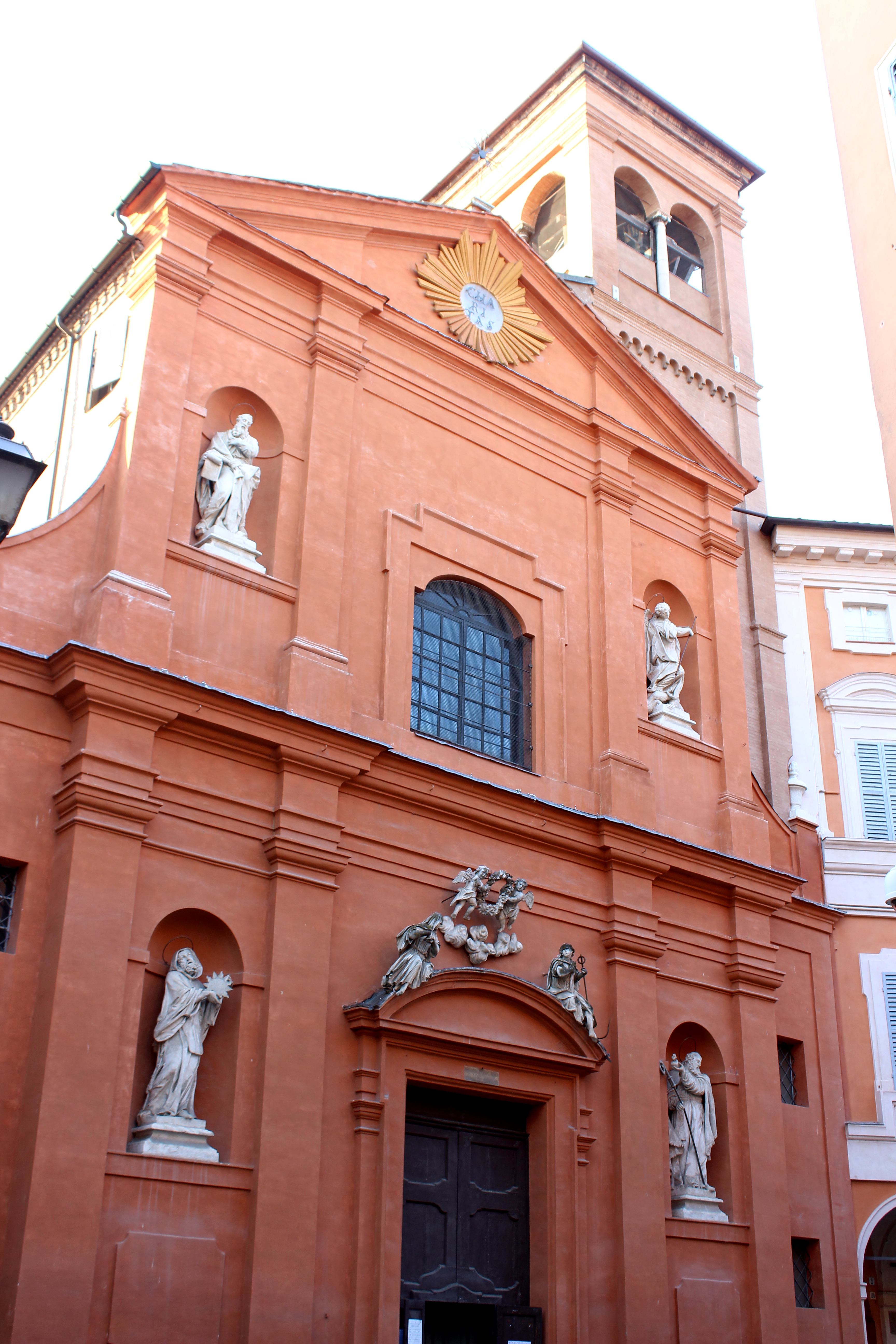 Chiesa di San Barnaba This is a photo of a monument which is part of cultural heritage of Italy.